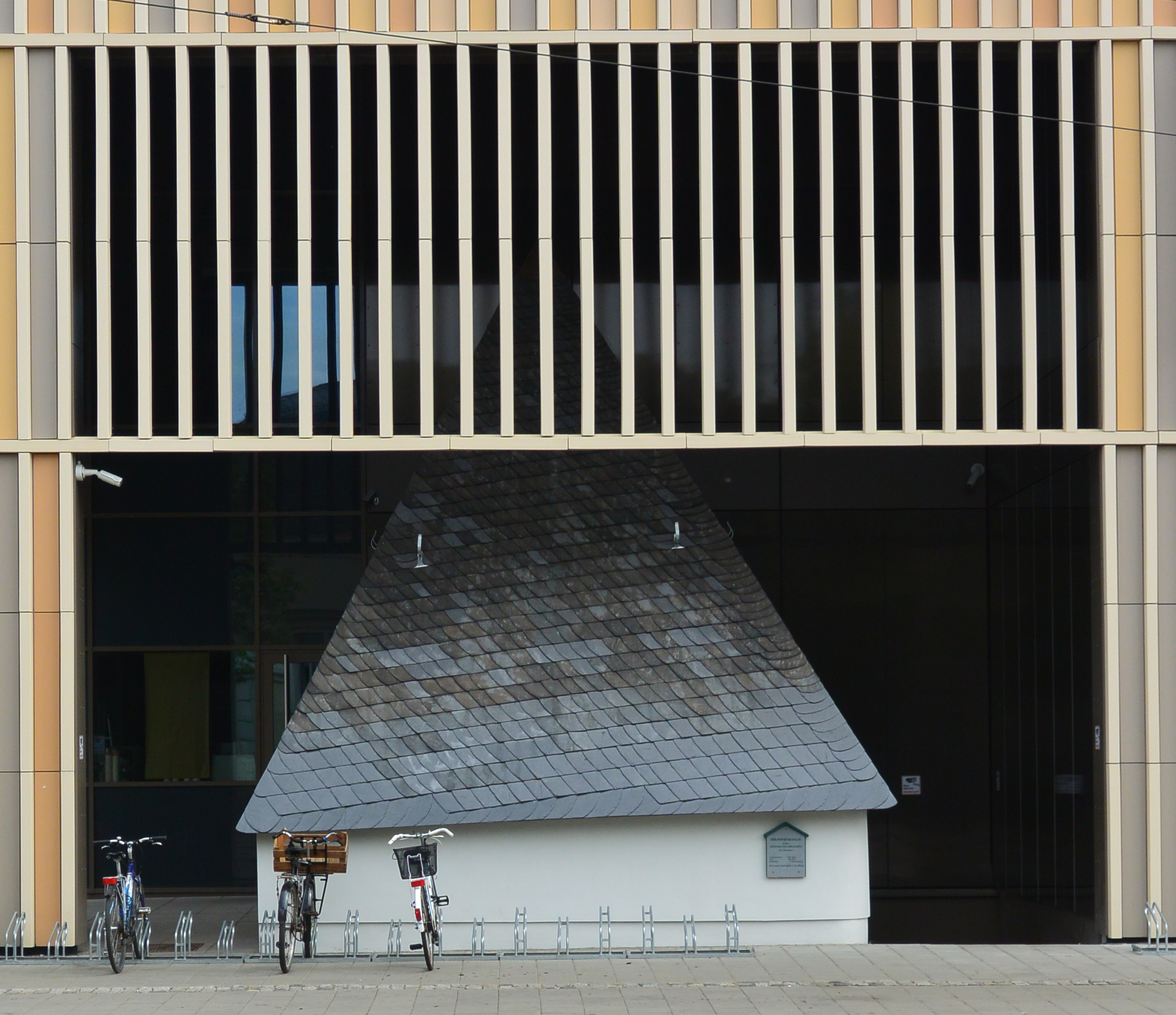 Brunnenhaus des Artesischen Brunnens am Albertplatz (Ecke Antonstraße) in Dresden, vom Simmel-Einkaufszentrum umgeben